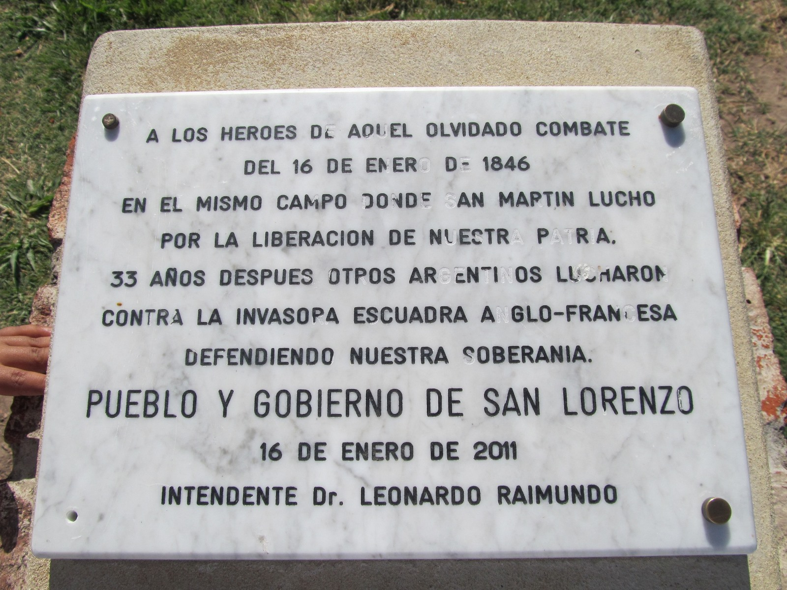 Placa conmemorativa del segundo Combate de San Lorenzo en el campo de la gloria, San Lorenzo, Santa Fe